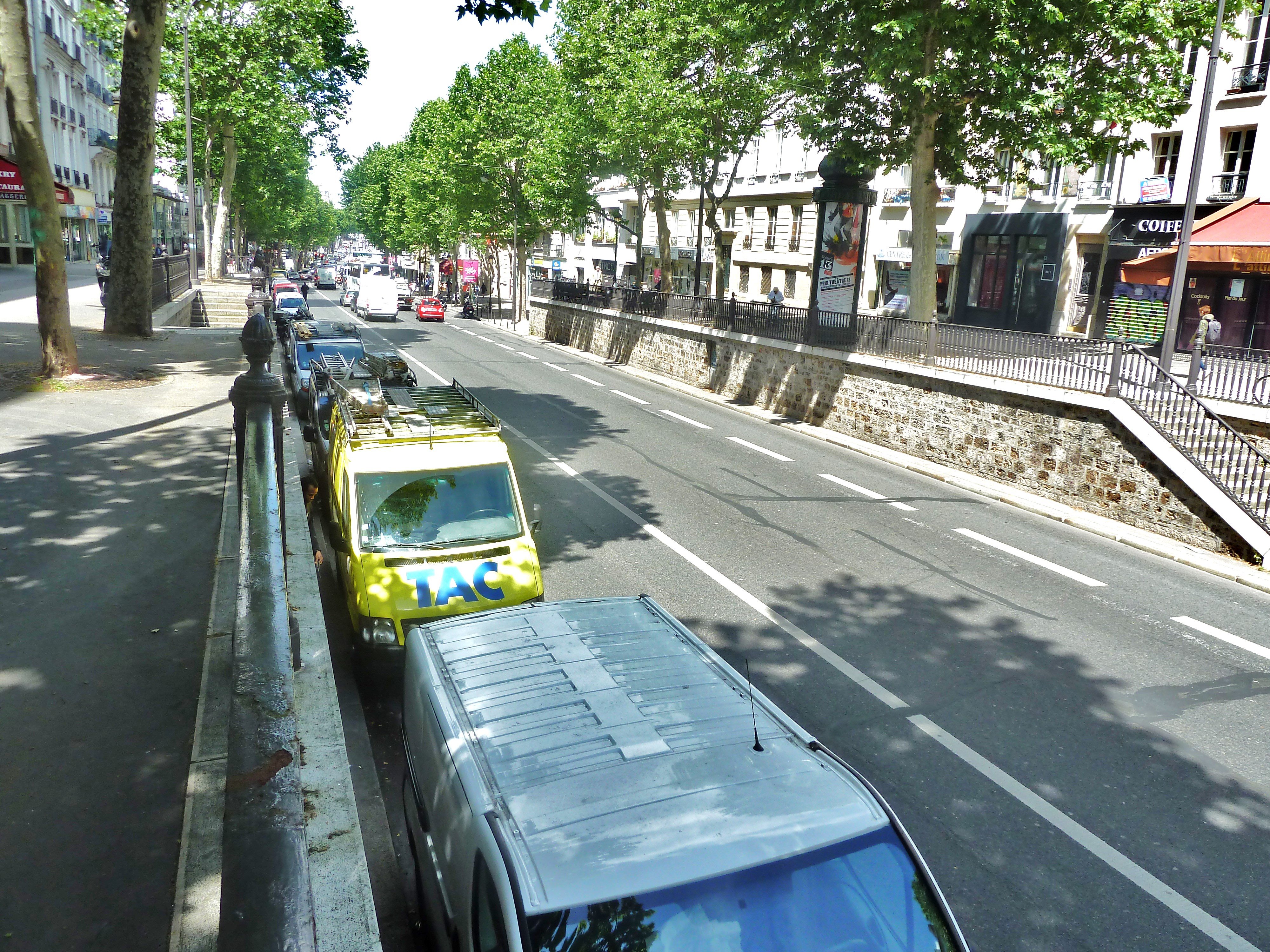 Paris - Boulevard Saint-Martin